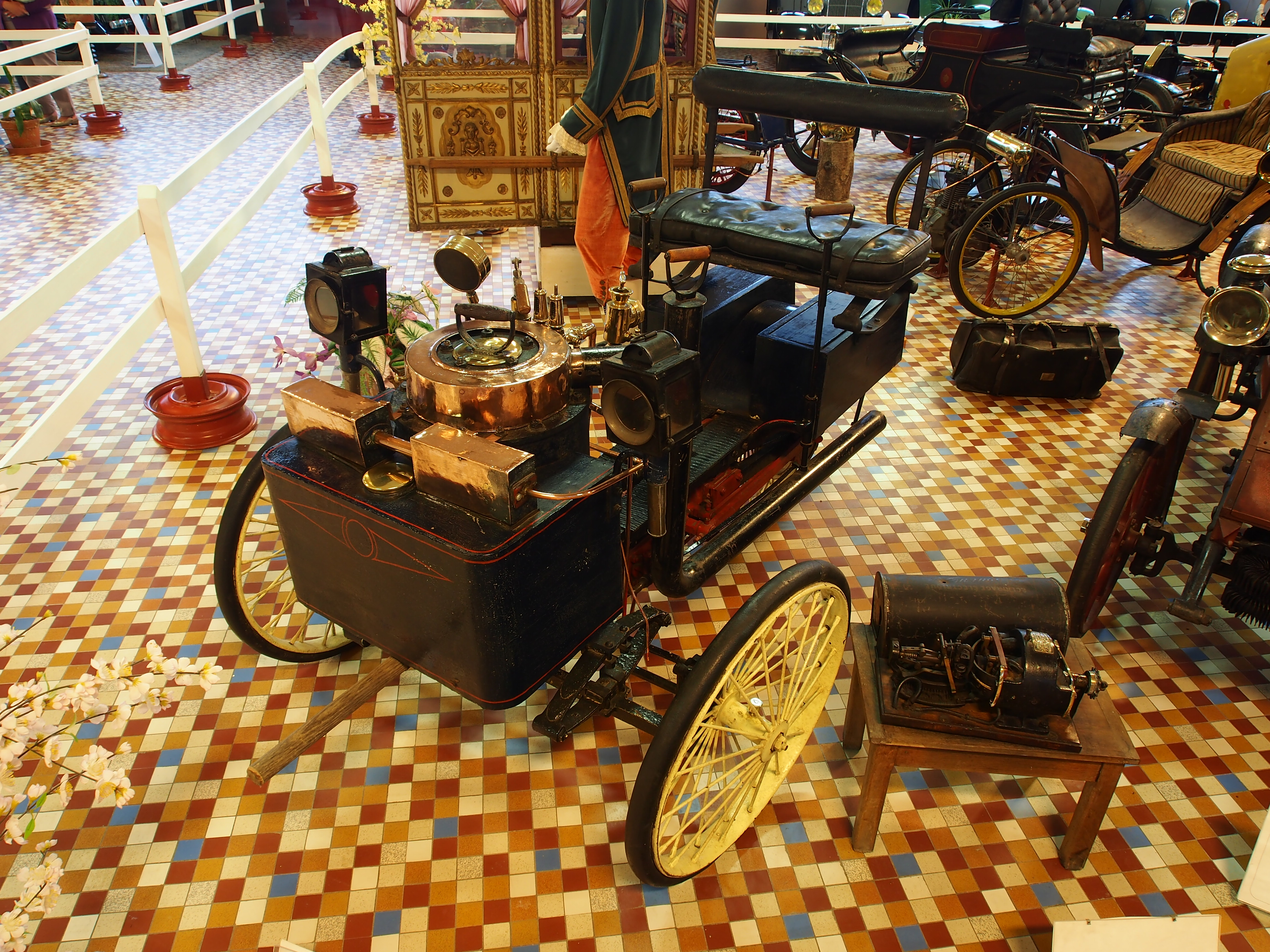 Photographed at the Musée Automobile de Vendée, France.